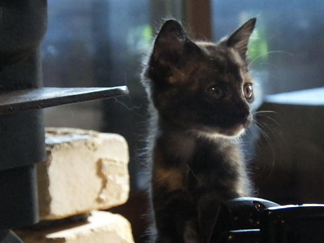 2019-06-16 Cat of Japan,Black tortoiseshell and white cat サビ猫子猫 Born in 2020-4-20 DSCF5099